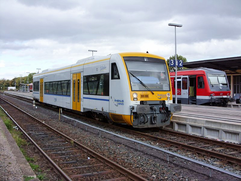 VT 1.01 "Selztaler" 95 80 0650 131-5-D-VEN. Regio-Shuttle RS1